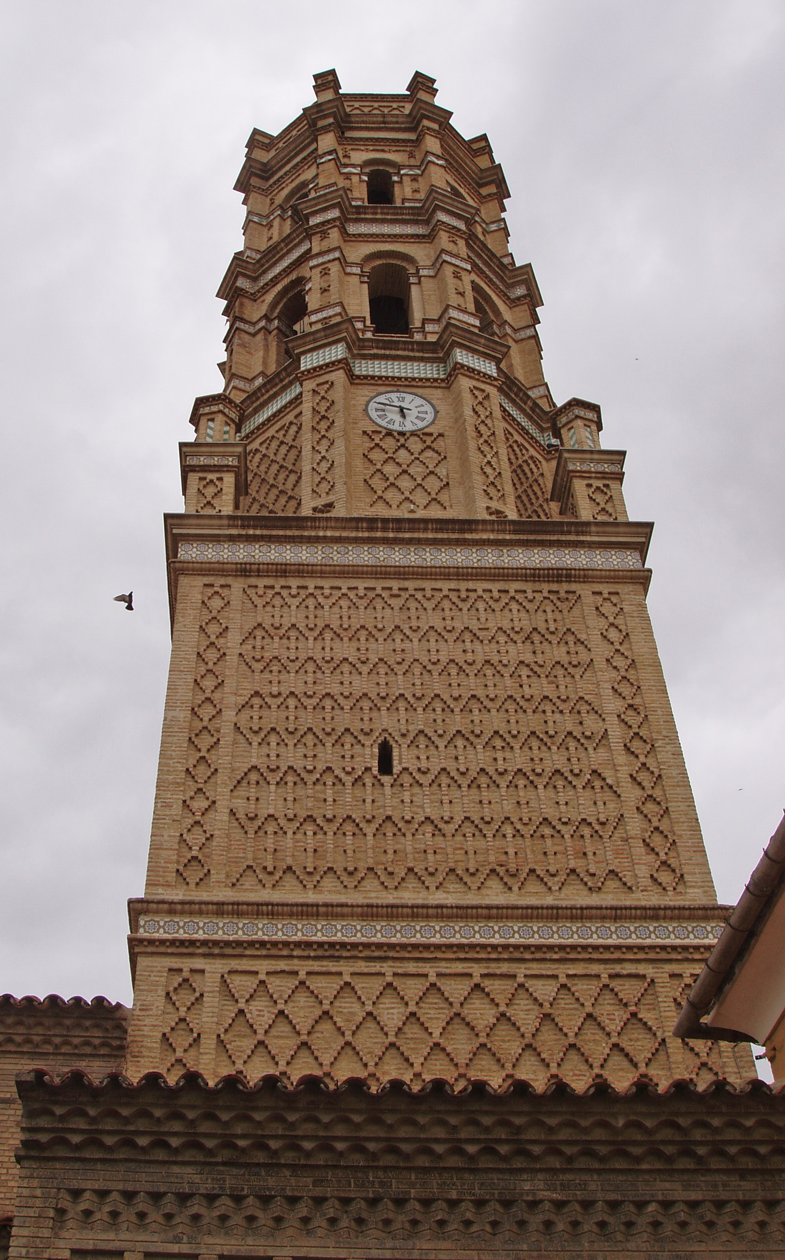 Torre mudéjar de la iglesia de Villamayor de Zaragoza (Zaragoza, España)